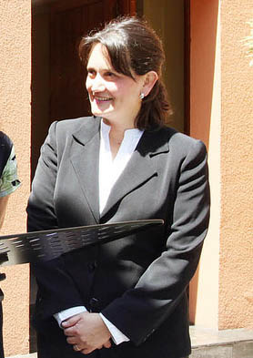 Laura Albornoz, política chilena.